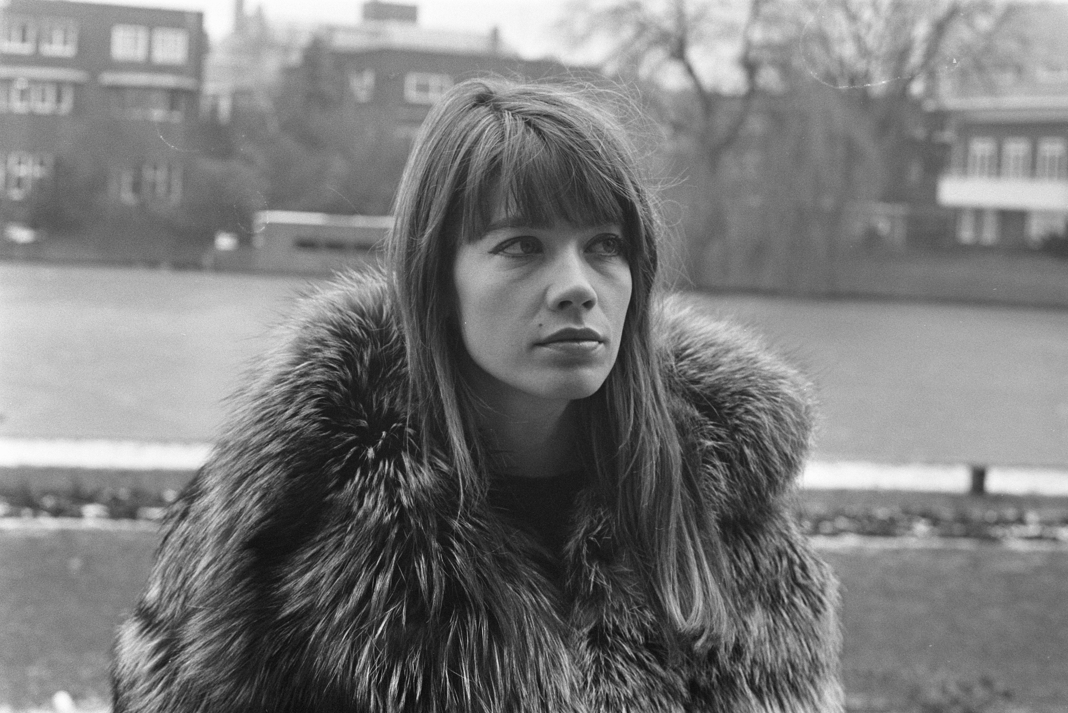 Collectie / Archief : Fotocollectie Anefo Reportage / Serie : [ onbekend ] Beschrijving : Franse zangeres-actrice Francoise Hardy in Amsterdam. Francoise Hardy Datum : 16 december 1969 Locatie : Amsterdam, Noord-Holland Trefwoorden : zangeressen Persoonsnaam : Francoise Hardy Fotograaf : Evers, Joost / Anefo Auteursrechthebbende : Nationaal Archief Materiaalsoort : Negatief (zwart/wit) Nummer archiefinventaris : bekijk toegang 2.24.01.05 Bestanddeelnummer : 923-0817